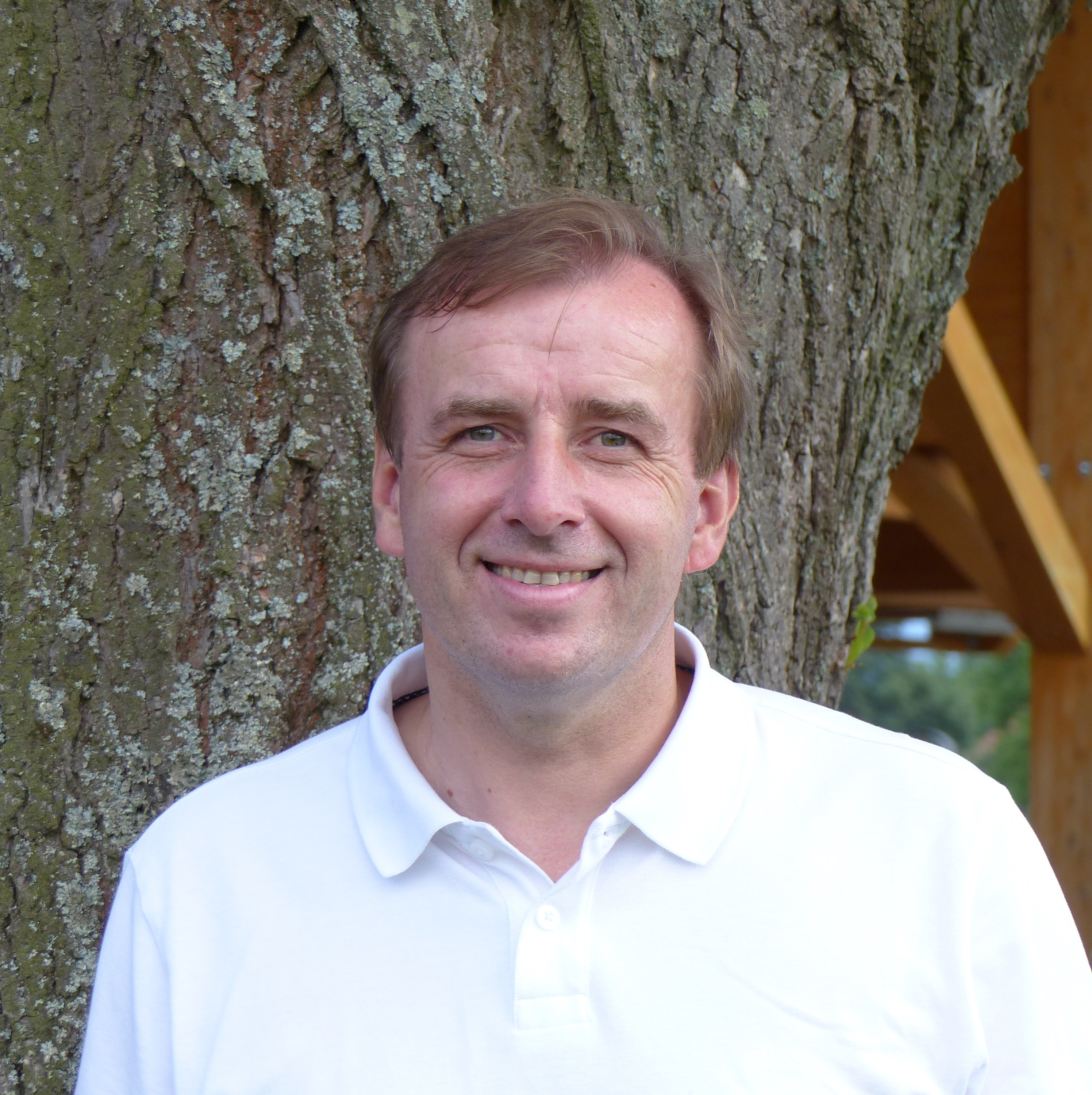 Christian Drobits beim 47. Internationalen ASVÖ-Vergleichsturnier 2017 in Pinkafeld